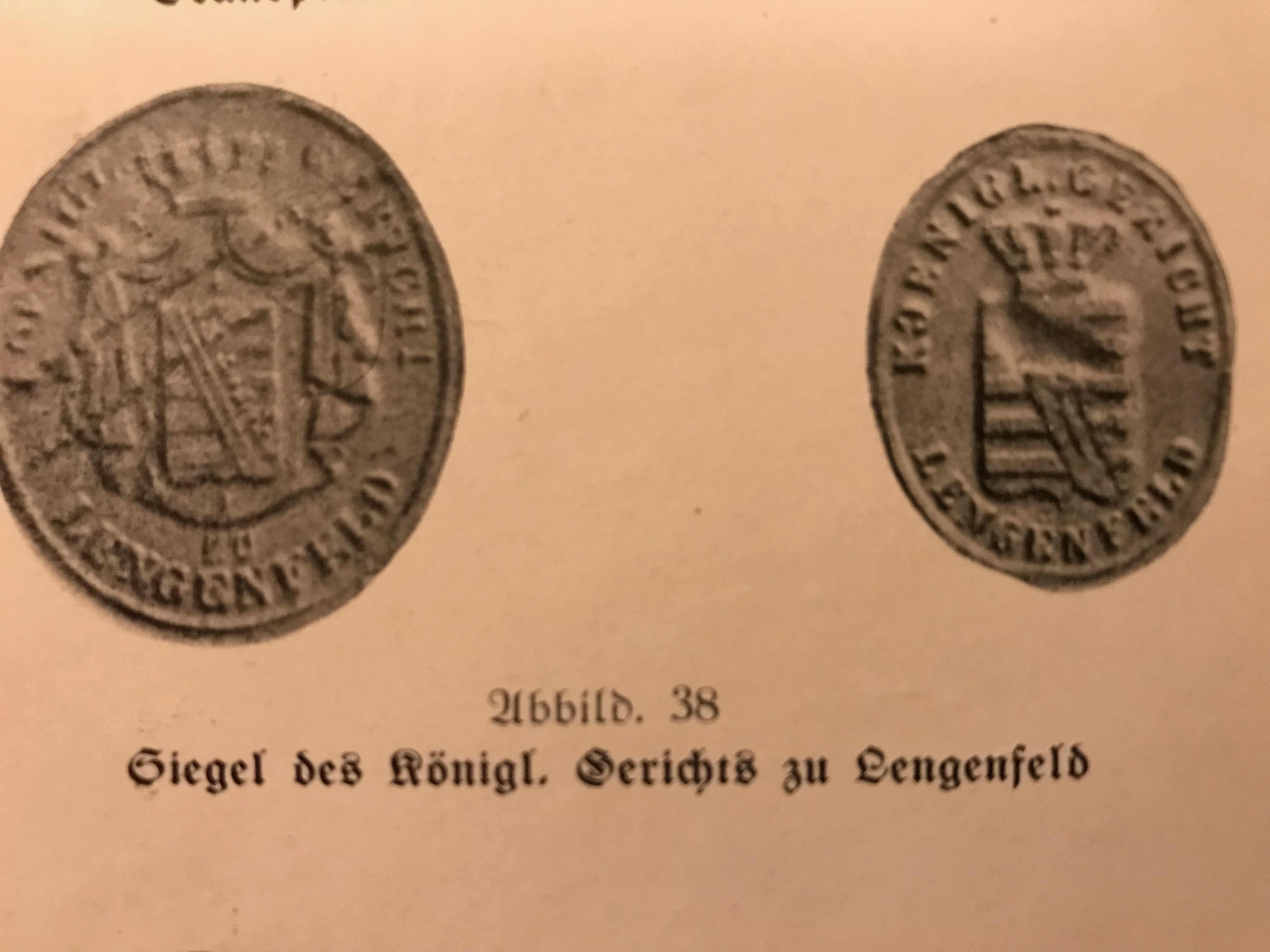 Siegel vom königlichen Gericht in Lengenfeld